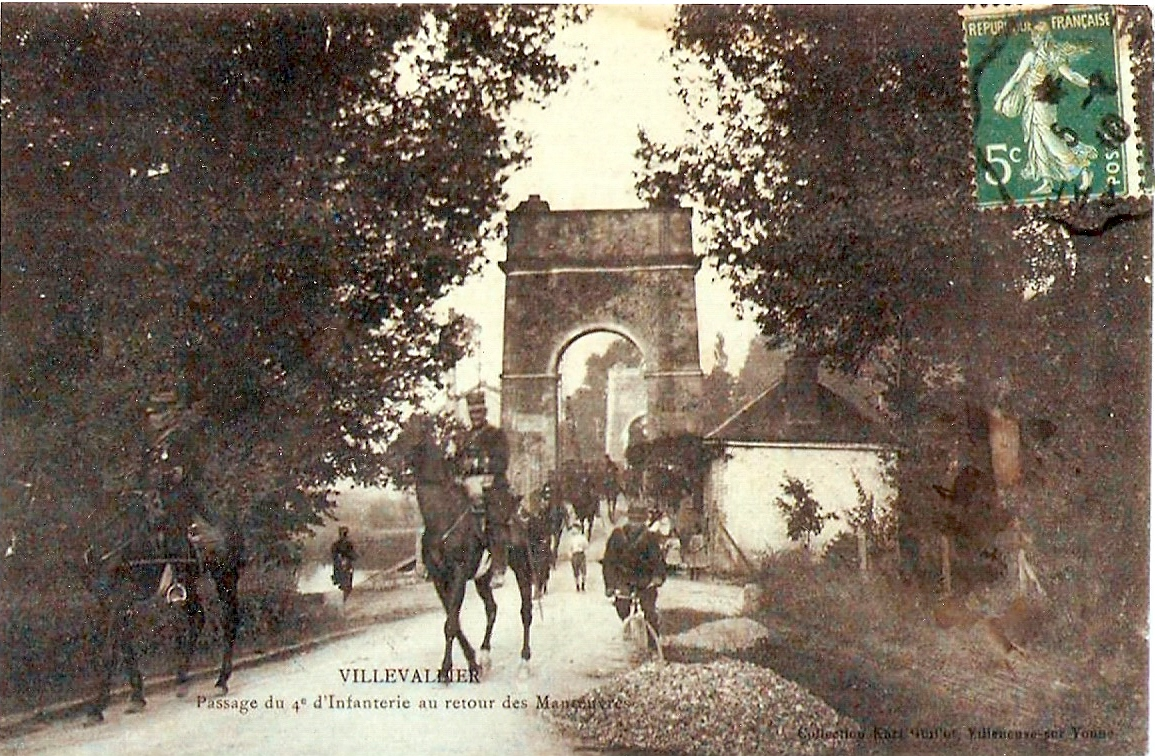 Il s'agit du passage du 4ème d'infanterie de saint julien du sault à villevallier (yonne) France Le 4 ème d'infanterie a été incorporé au 204eme d'infanterie en 1914 L'image a donc environ 98 ans = PD old 70